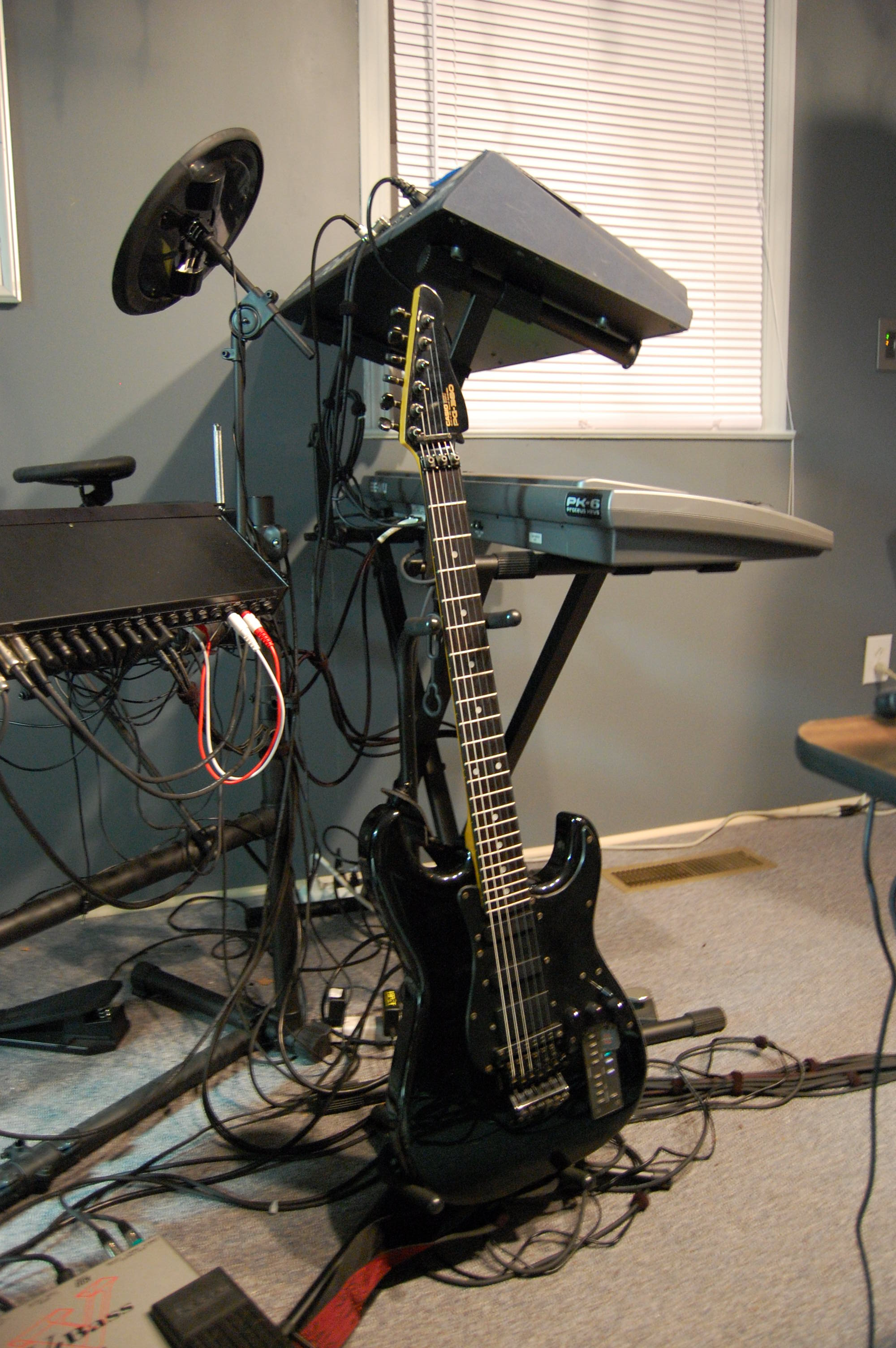 Casio PG-380 synth guitar